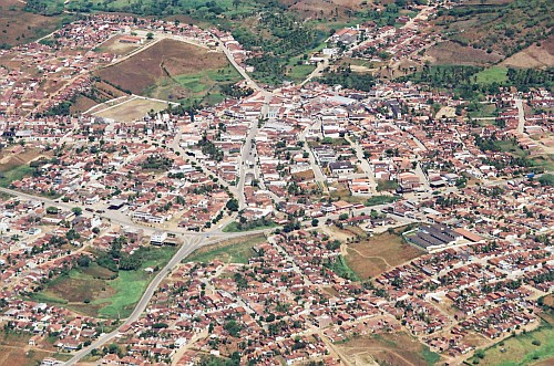 Foto aerea do centro de Passira